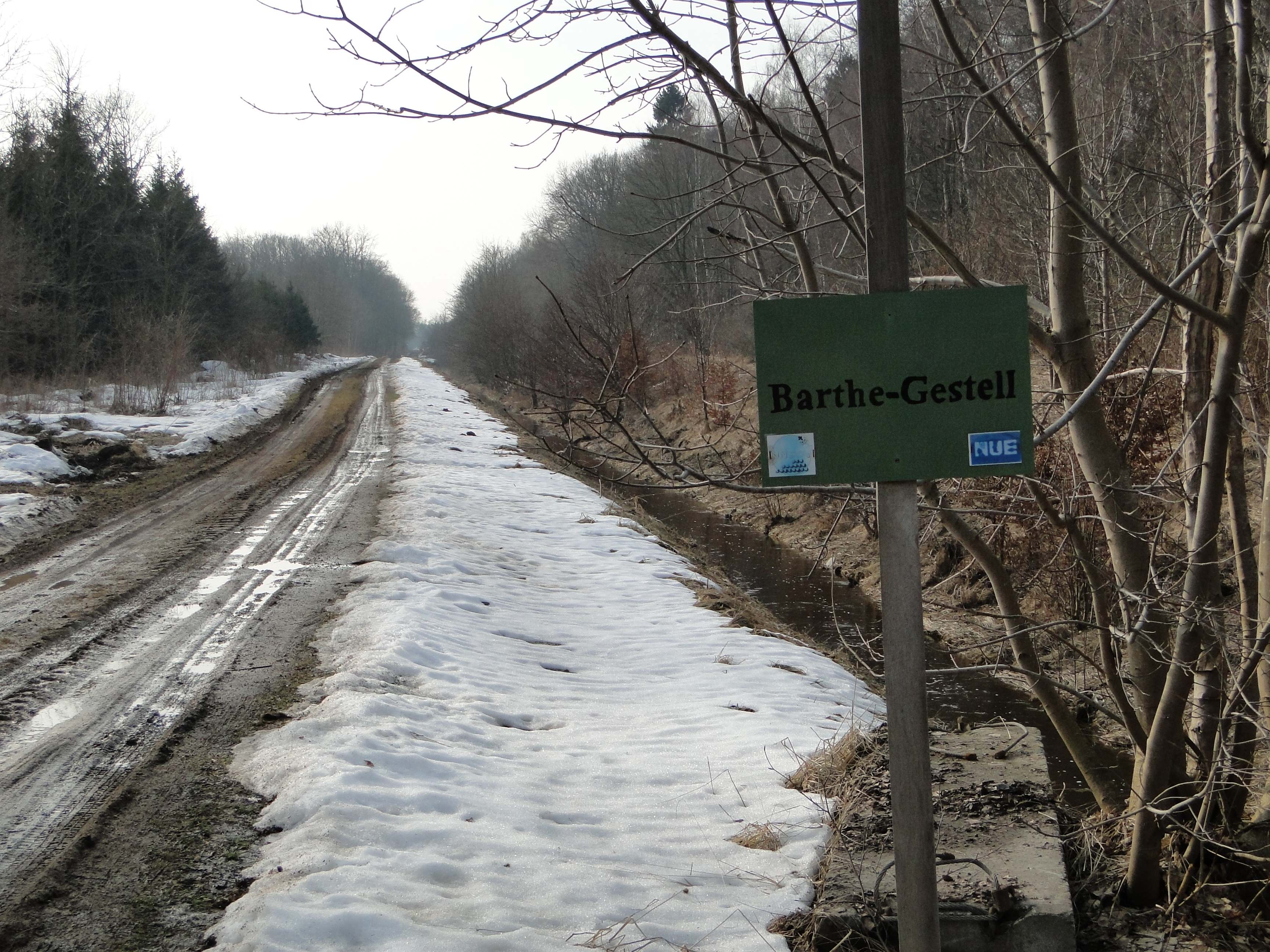 Naturschutzgebiet Abtshagen, Mecklenburg-Vorpommern. - OpenStreetMap(Info)